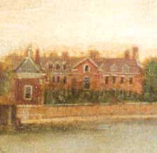 Richmond House, Twickenham